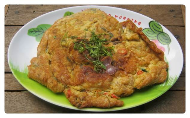 ไข่ยัดใส้